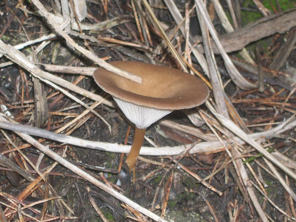 Cama-sec (Clitocybe sp.), Mallorca.